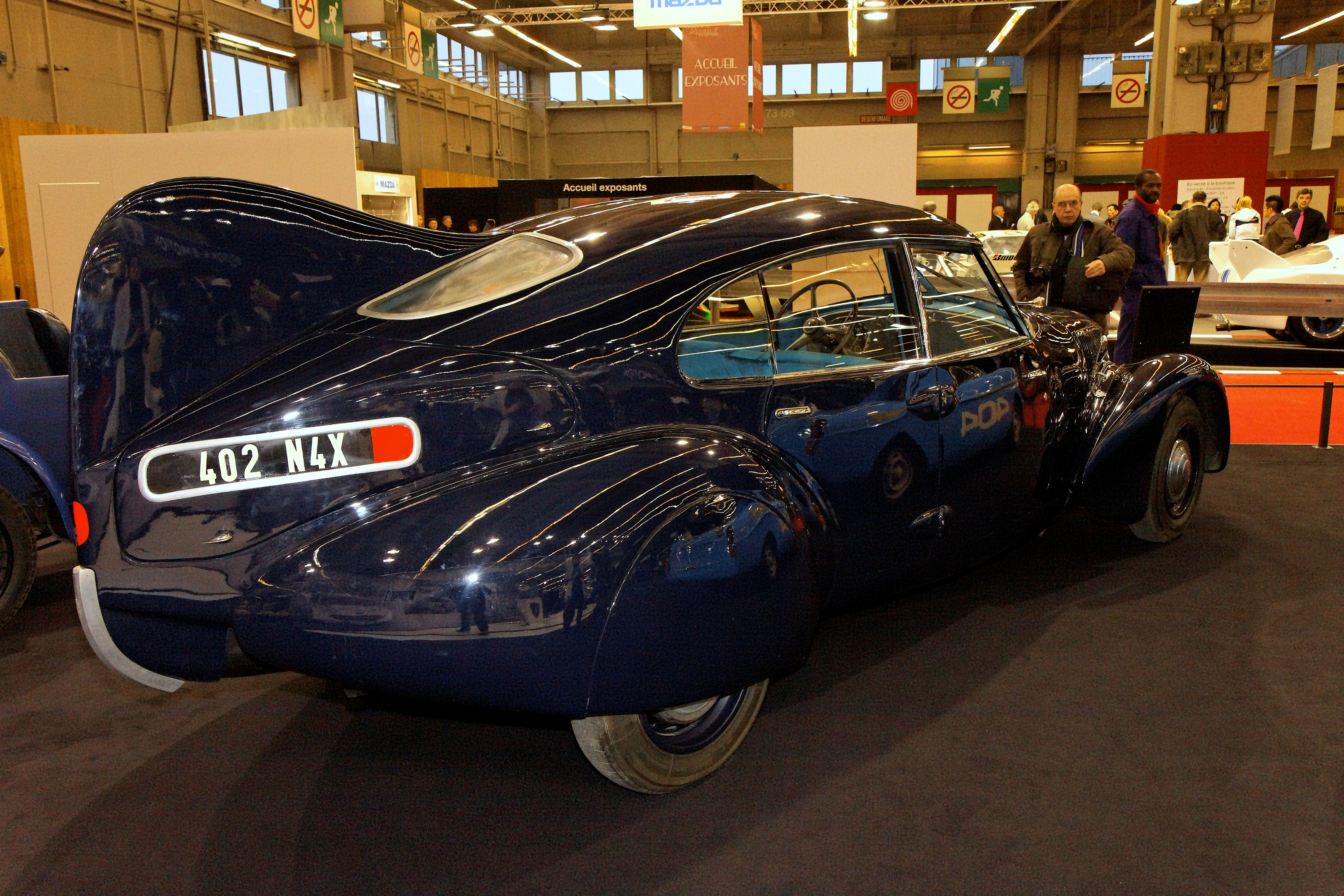 Photographie prise lors du salon rétromobile 2011 à Paris, porte de Versailles.